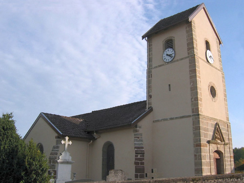 Eglise Saint-Martin